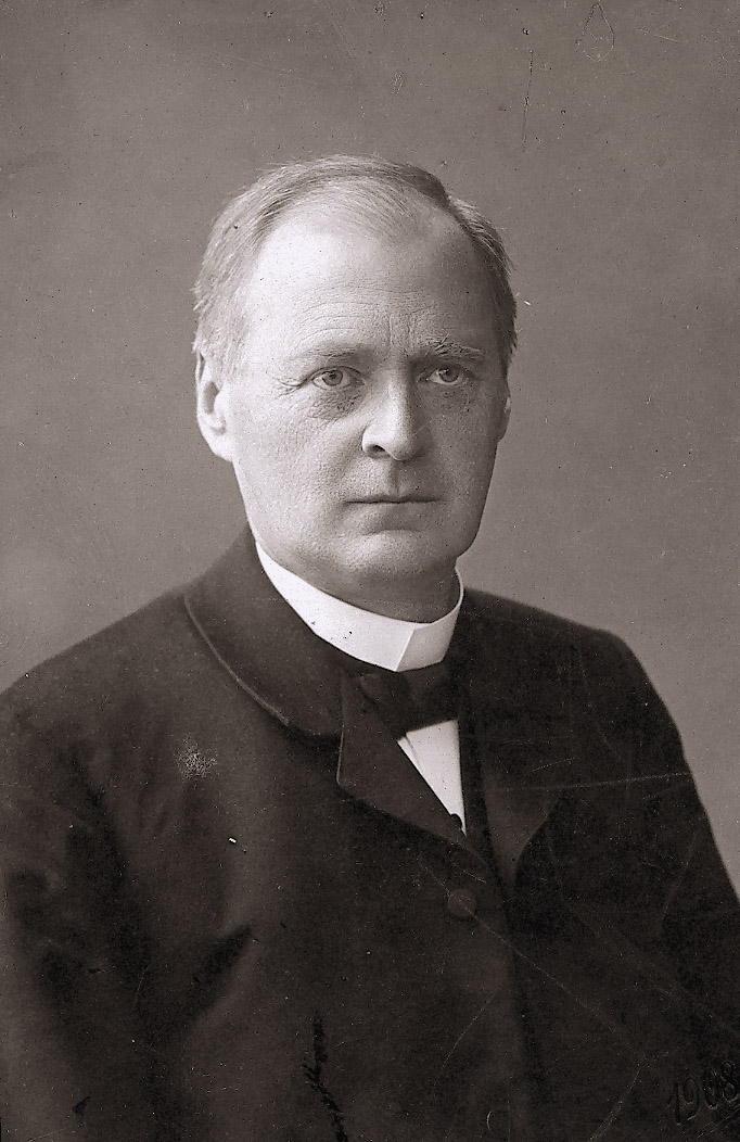 Jan Pawoł Křižan (1854–1923)